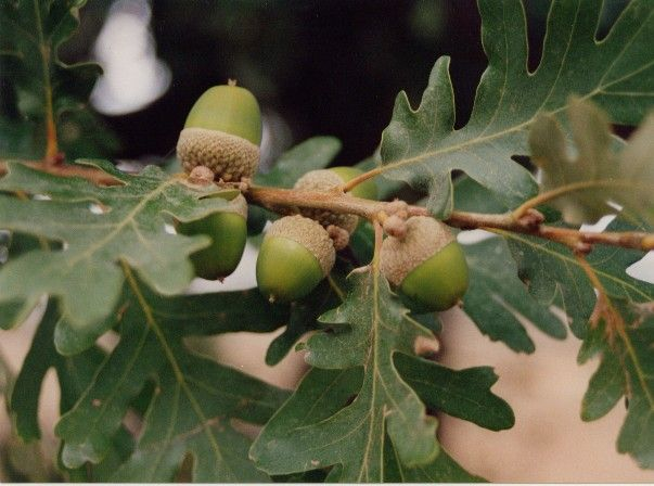 Quercus pyrenaica . Narros del Puerto. Ávila. España